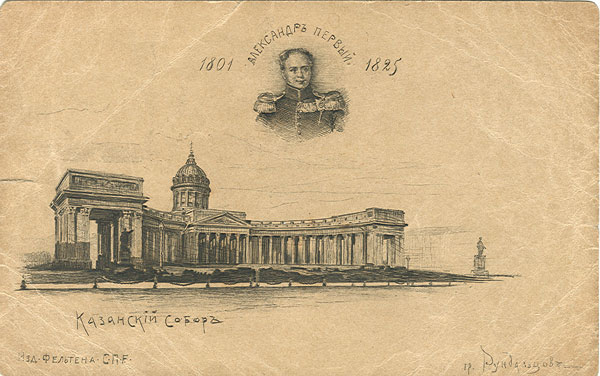 Портрет Императора Александра I (1777-1825) и вид на Казанский собор